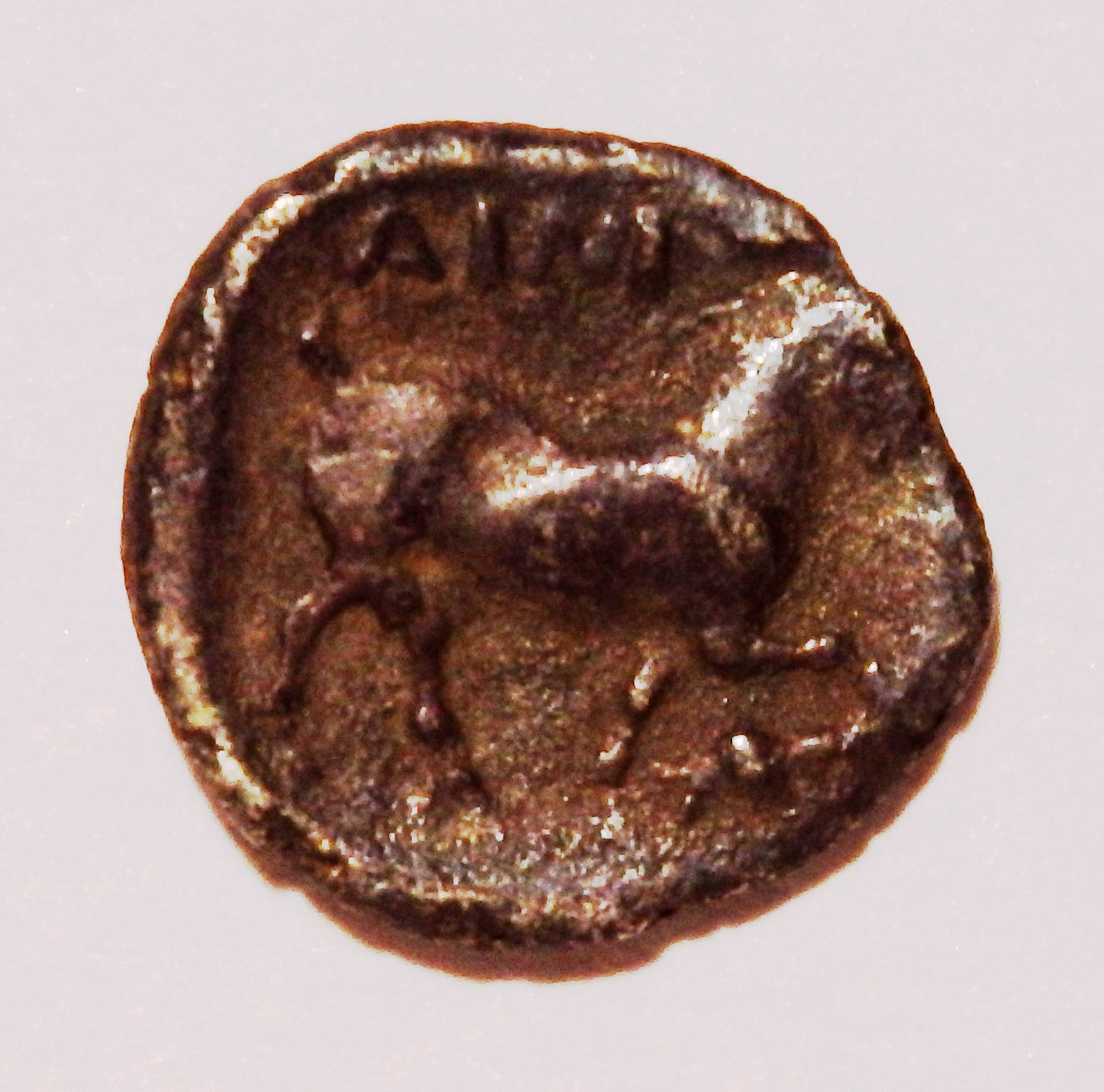 Diobol aus Ainos mit Stadtnamen über Ziege, ca. 435-405 v. Chr. geprägt vgl. Szaivert/Sear 1693